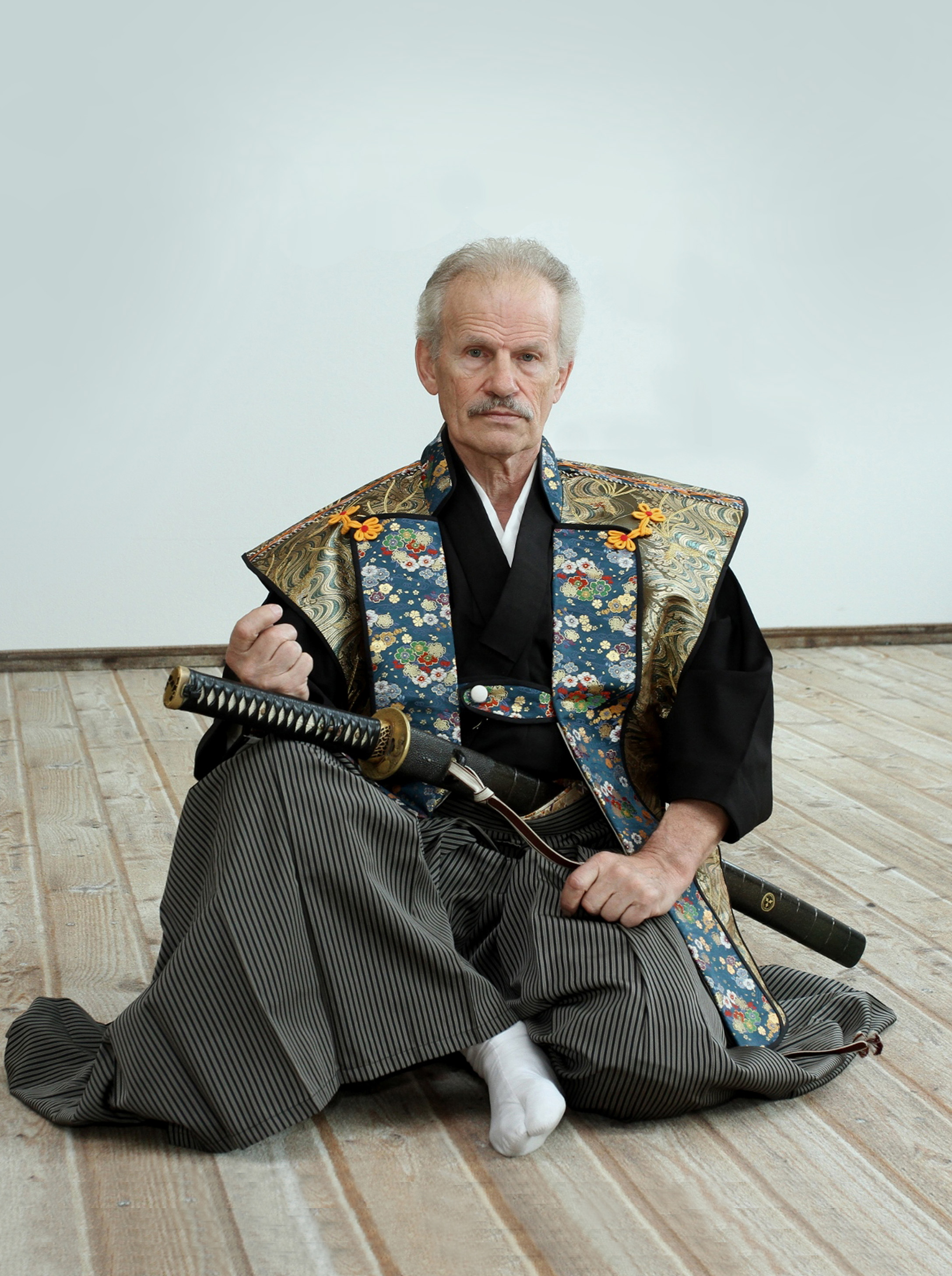 Erwin Steinhauser im Jinbaori und in der Position Tatehiza